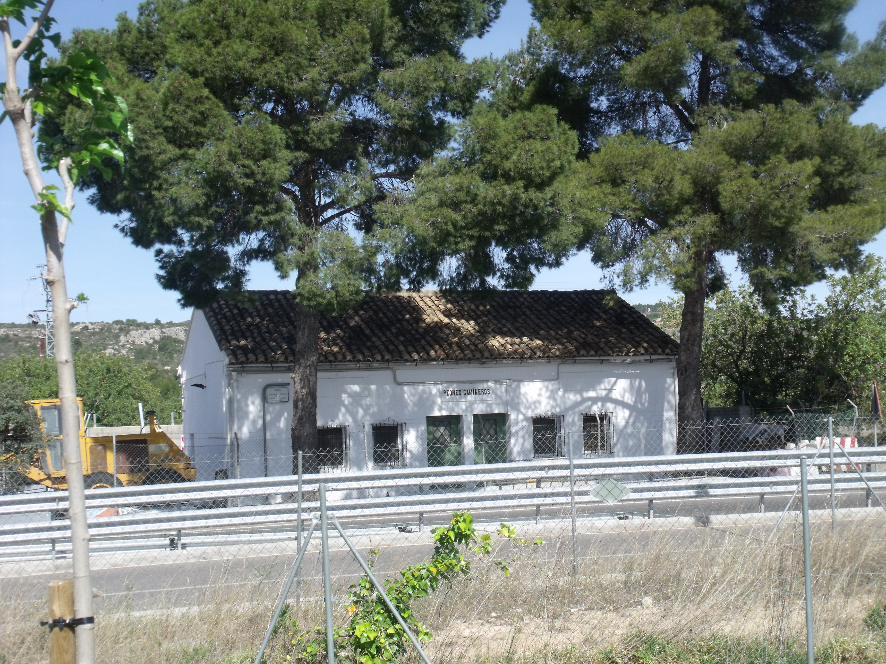 Caseta de peones camineros. Alborache.